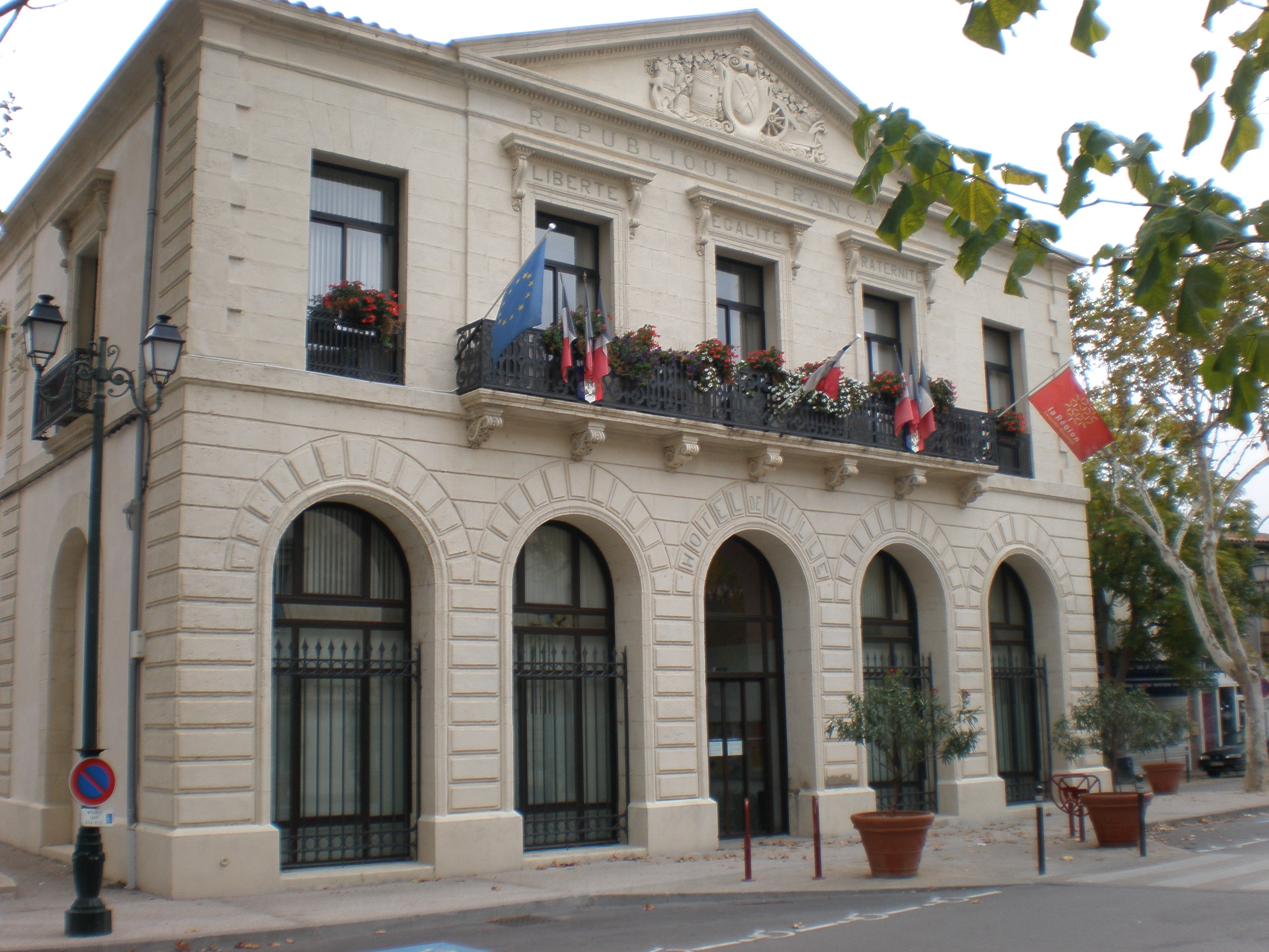 La mairie de Saint-André-de-Sangonis (Hérault)